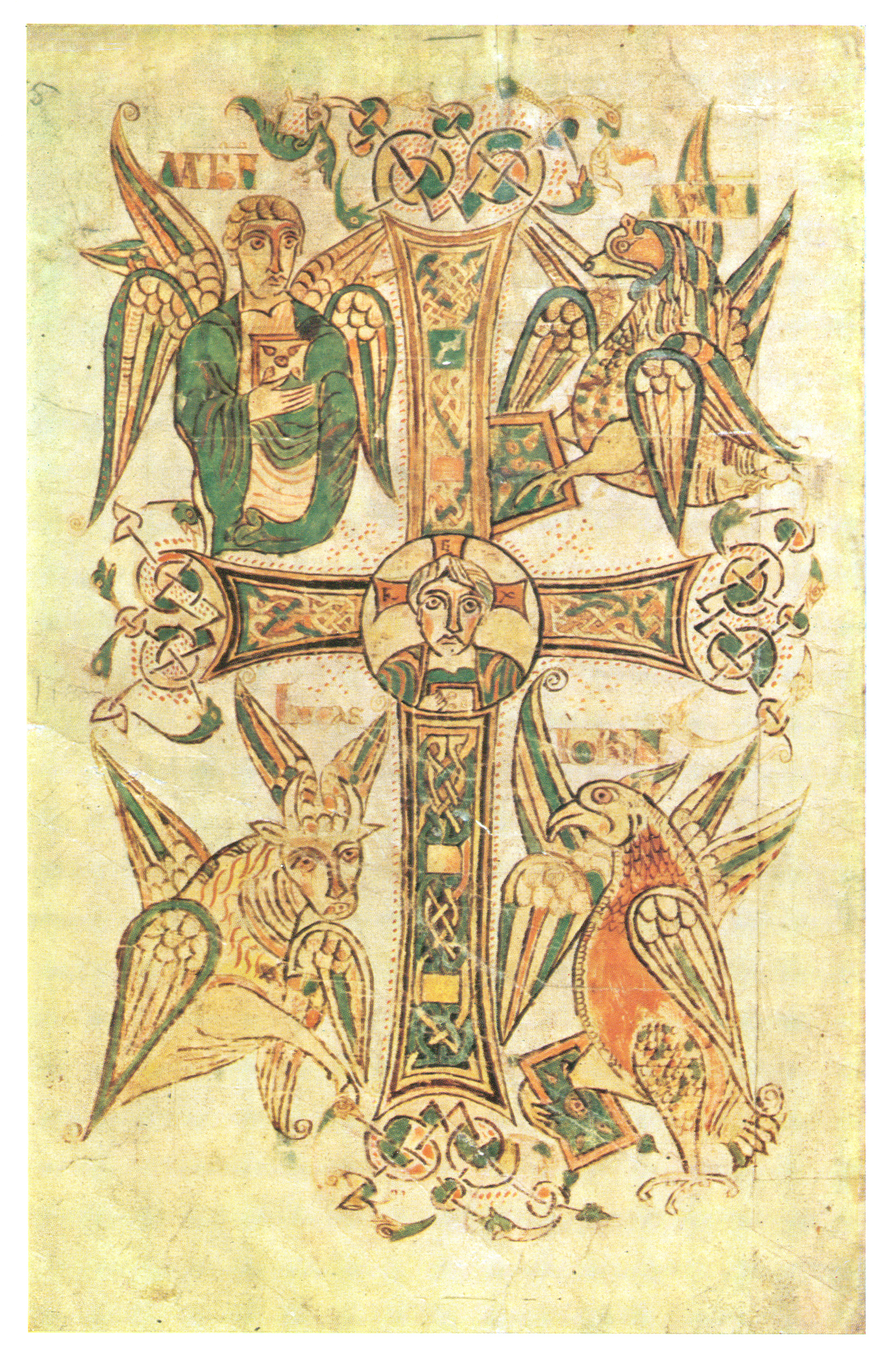 Eingangsblatt eines karolingischen Evangeliars, Buchmalerei